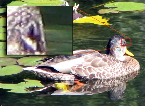 Eksempel på bitmap, dette bildet er fotografert av meg og behandlet av meg og frigitt. Bitmap eller rastergrafikk passer godt for fotografiske bilder, og hvis man forstørrer utsnitt av det, f.eks. øyet, ser man tydelig at det består av små fargeblokker som kalles for piksler. Bildet er altså bygget opp som et rutenett av farger.